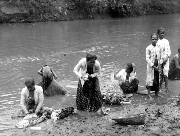 Negatief. Javaanse vrouwen tijdens het wassen van kleding in de rivier